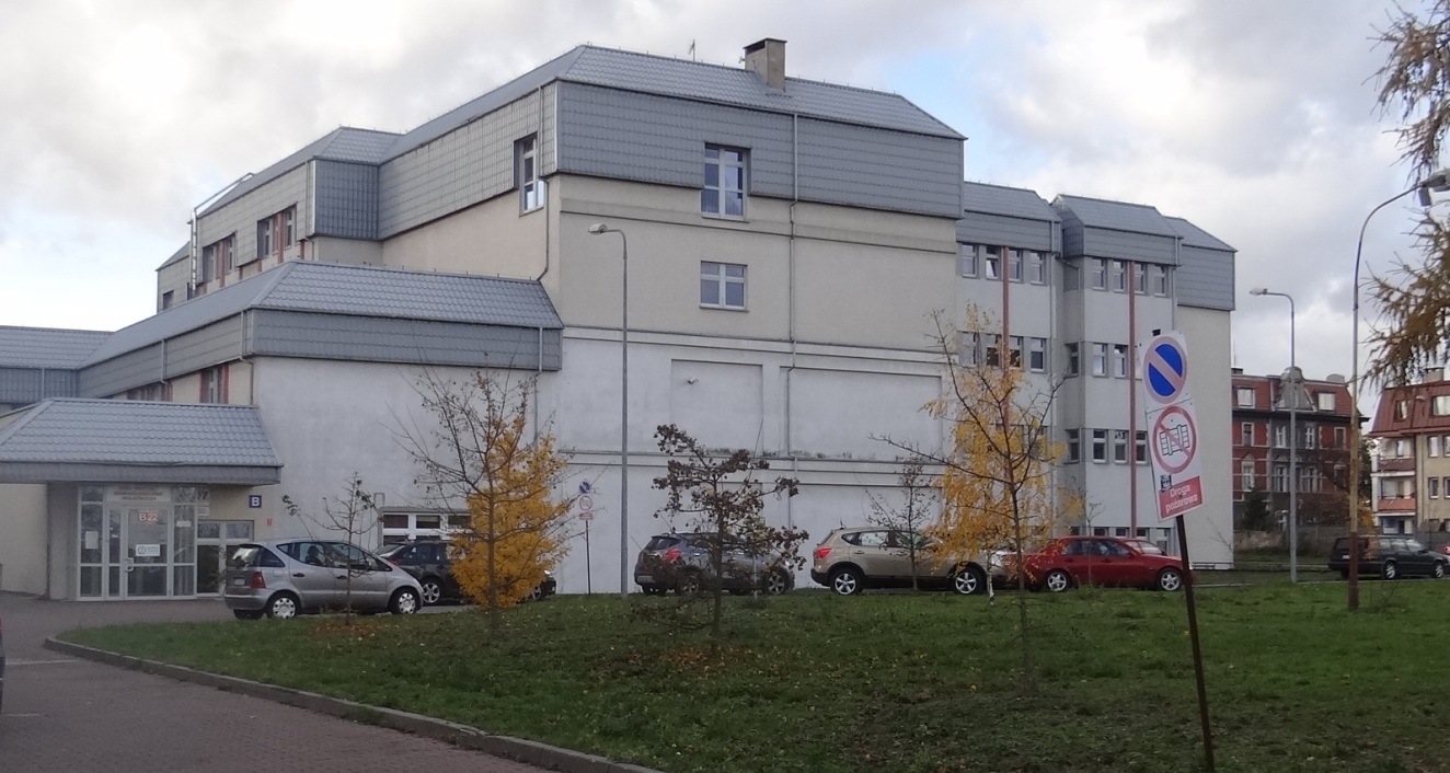 Szpital 2015r. Budynek B i między innymi Położnicza Izba Przyjęć, Pawilon Ginekologiczny